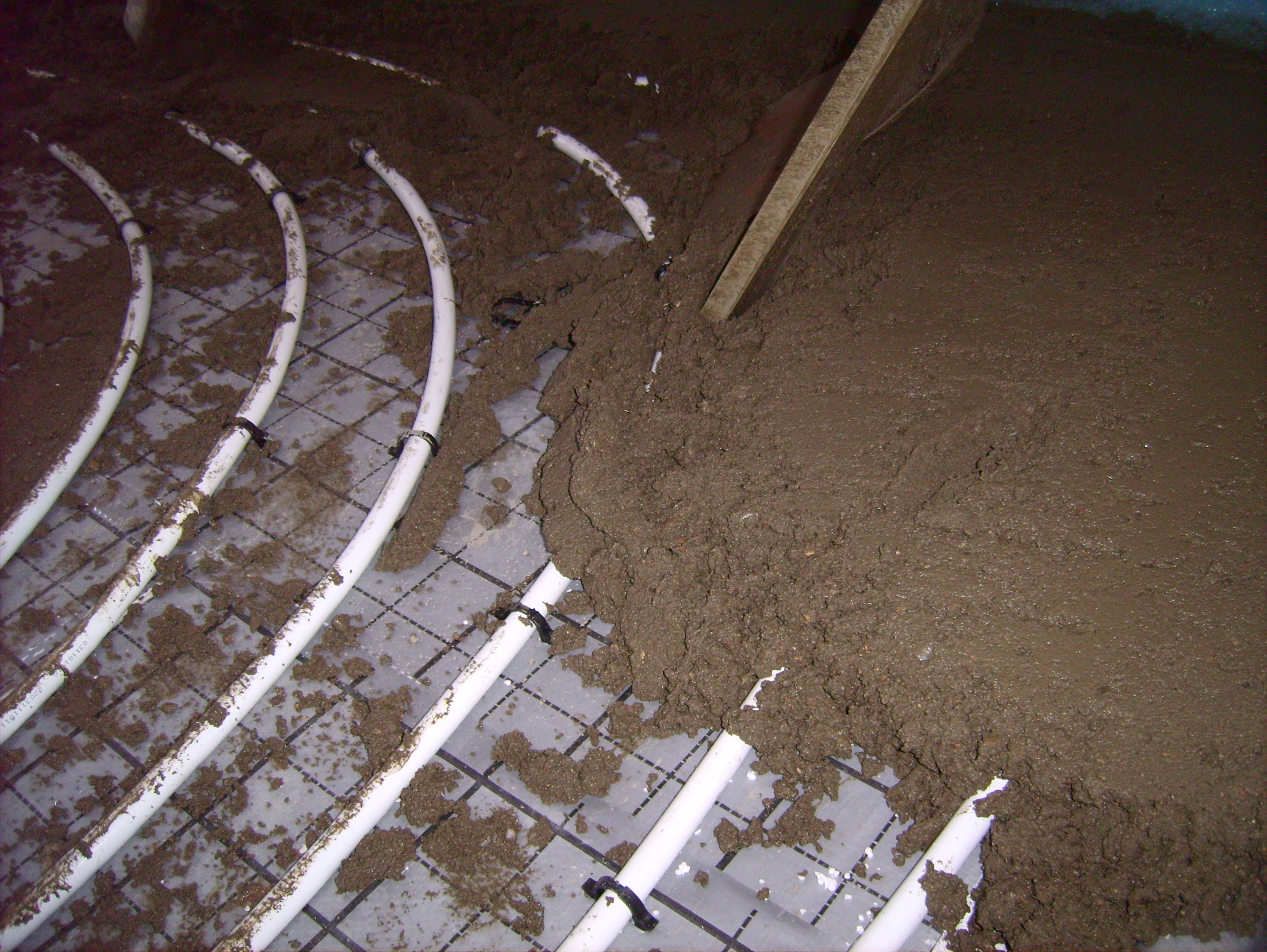 Estrichverlegung